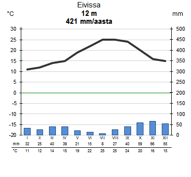 Eivissa kliimadiagramm